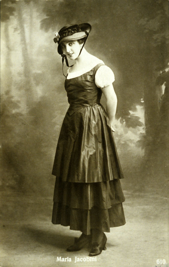 attrice Maria Jacobini